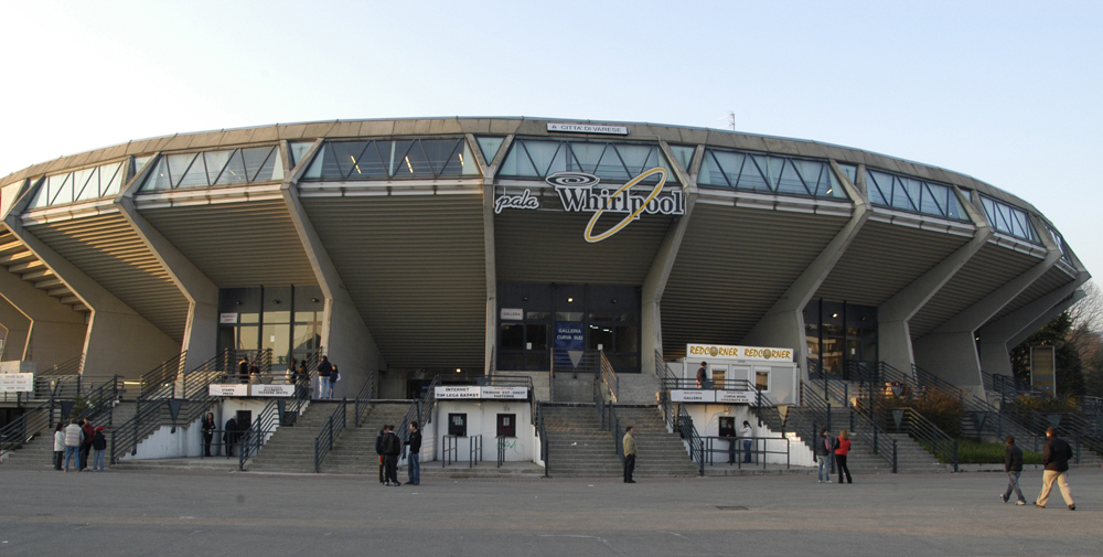 Immagine rilasciata dal proprietario della stessa, pallacanestro Varese